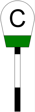 Железнодорожный сигнал «Требуется подача свистка»